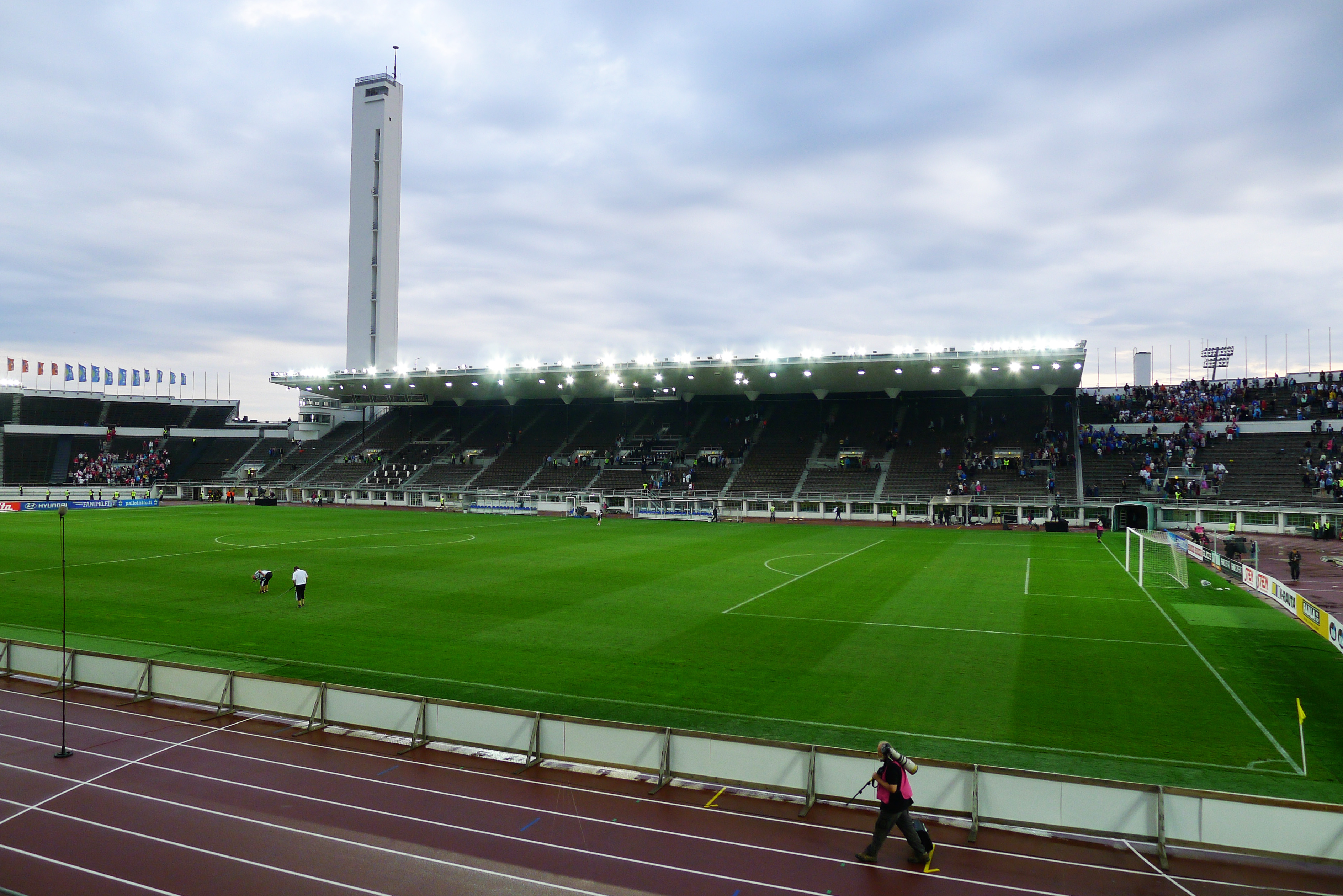 Helsingin olympiastadion 7.6.2013